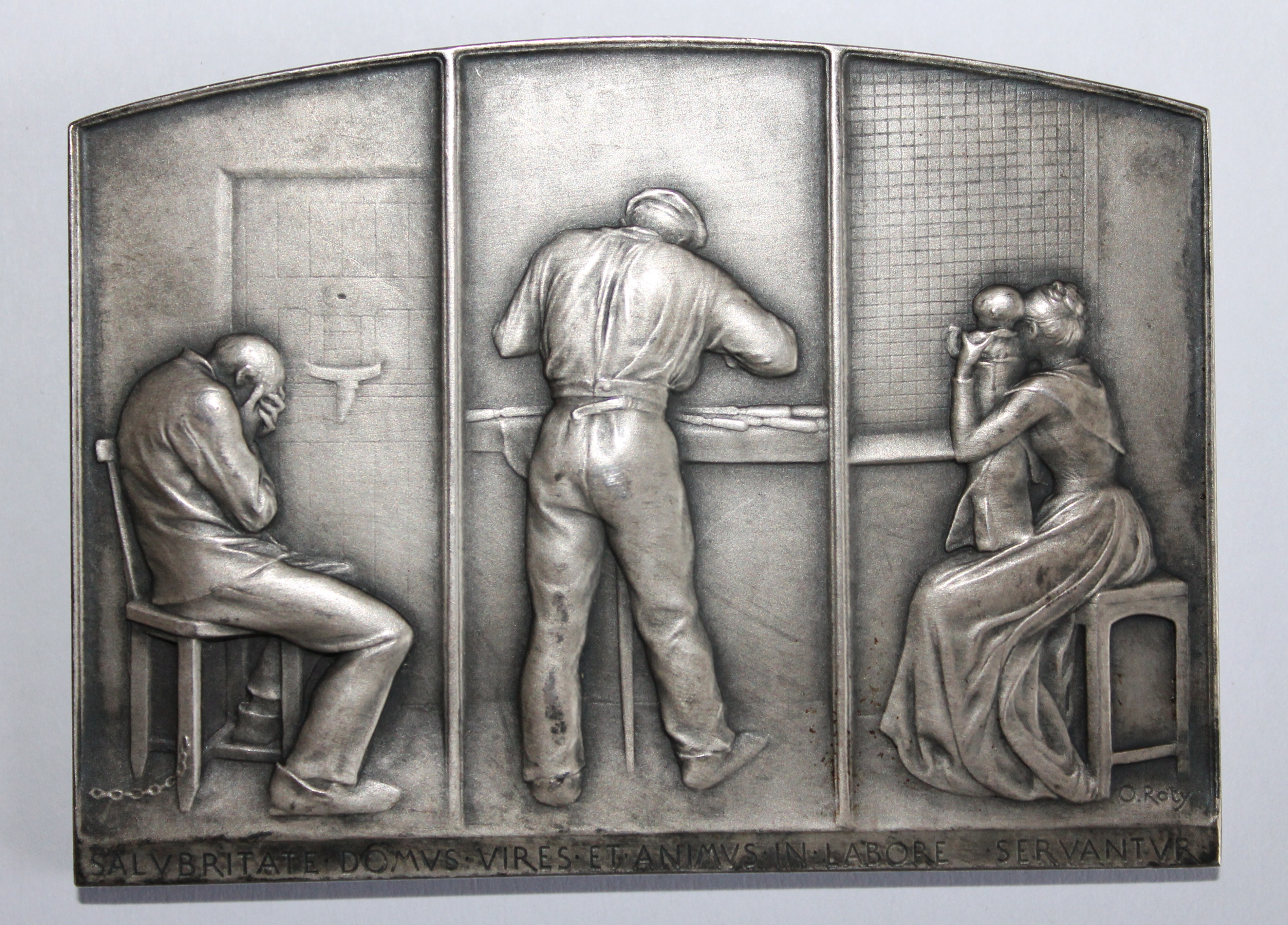 Plaquette argent, inauguration de la prison de Fresnes (1900) par Oscar Roty